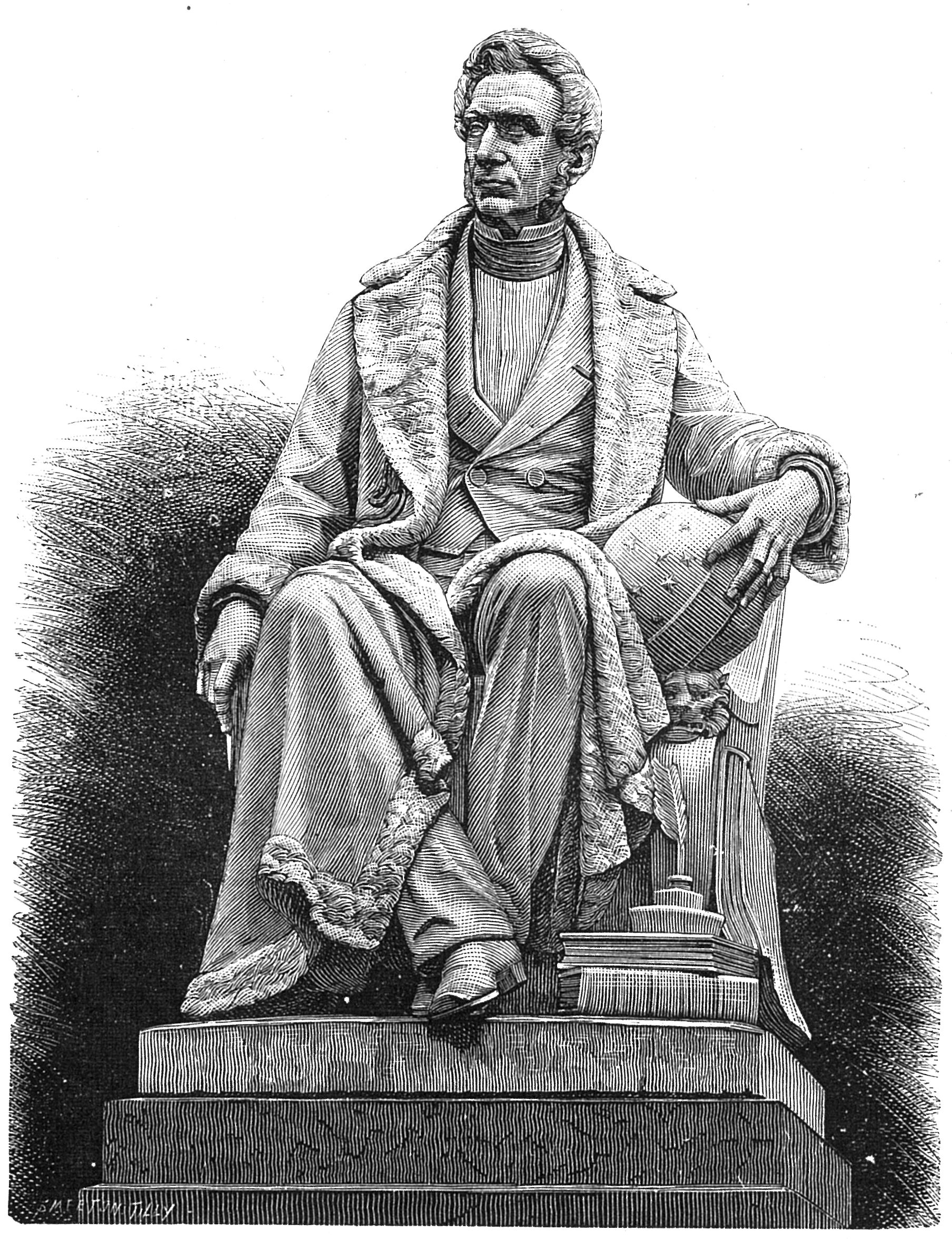 Statue élevée à la mémoire d'Adolphe Quetelet (1796-1874). Statue de Fraikin. Devant le Palais des Académies à Bruxelles. Inaugurée le 11 mai 1880.